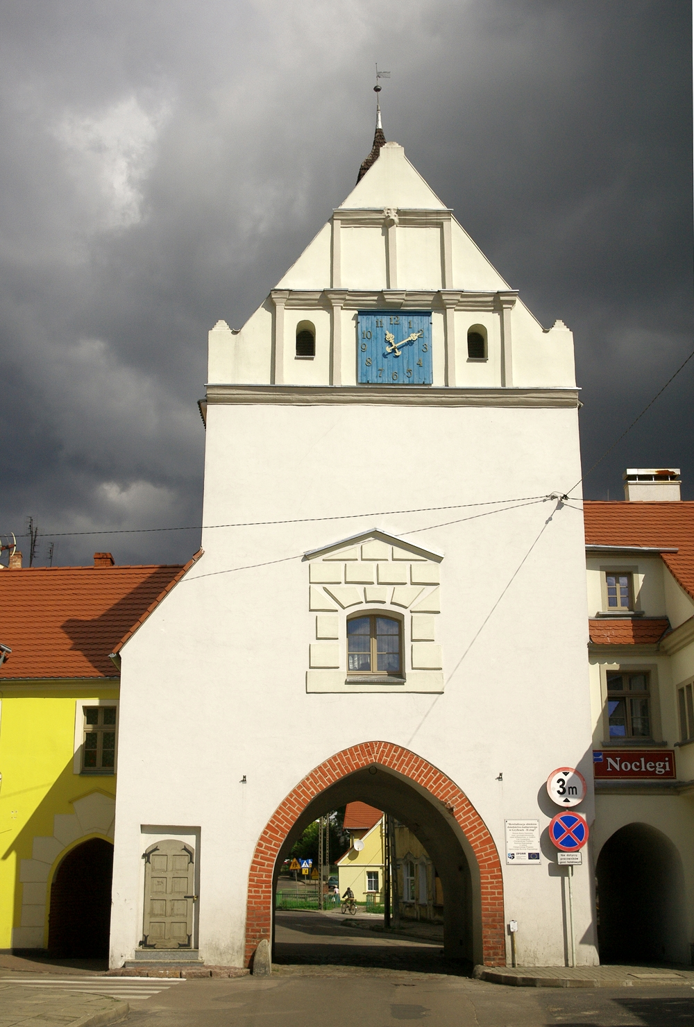 Dawna brama miejska , dziś dom pracy twórczej